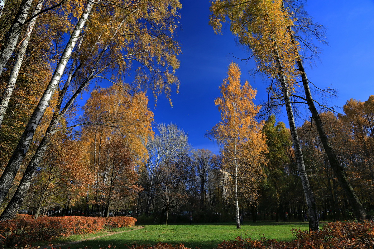 Парк "Сокольники", Восточный округ This image is related to the protected area of Russia number 7710274